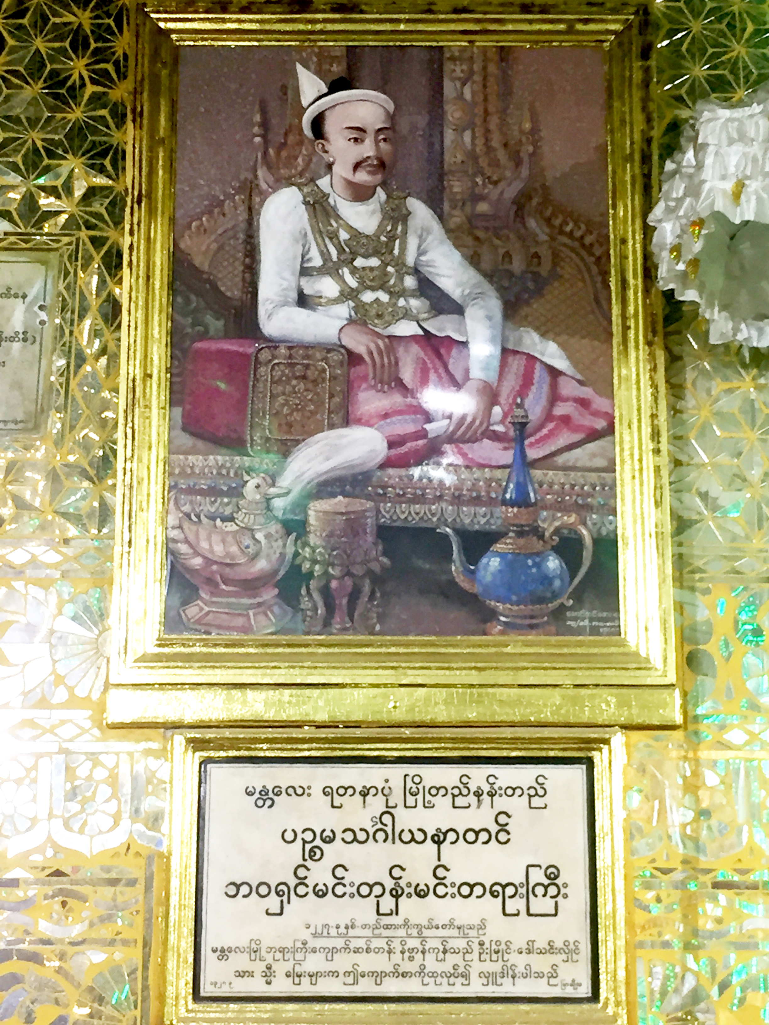 မြန်မာဘာသာ: မန္တလေးတောင်ခြေရှိ ကျောက်တော်ကြီးဘုရားအတွင်းရှိ ဘဝရှင် မင်းတုန်းမင်းတရားကြီး ပုံတော်